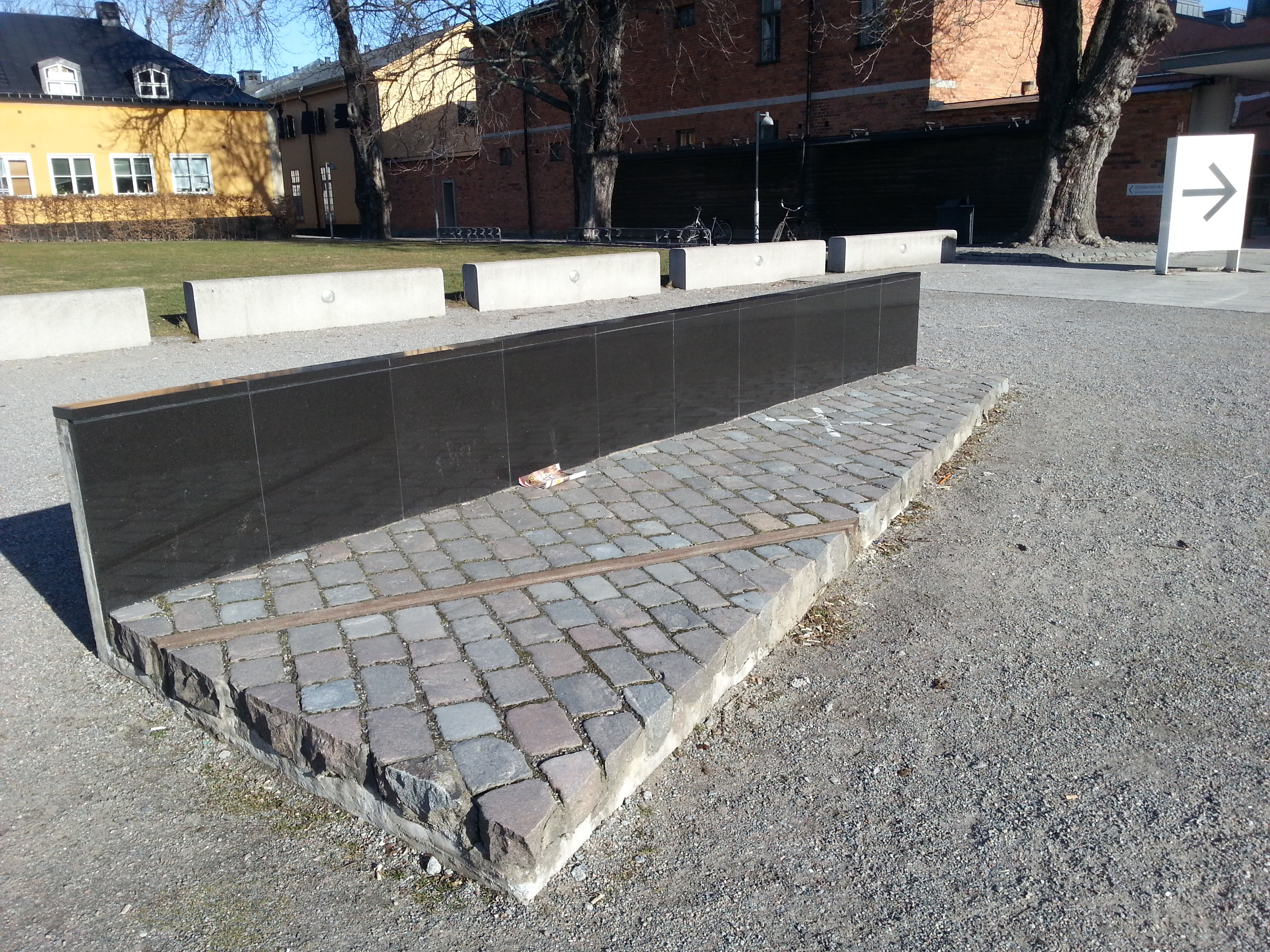 Leninmonumentet 13 april 1917 (1977) - Björn Lövin This reproduction of an architectural work or work of art, is covered under the Swedish law of copyright for literary and artistic works (Law 1960:729, paragraph 24), which states that "Work of art may be depicted if it is permanently placed on or at a public place outdoors. Buildings may be freely depicted." See Commons:Freedom of panorama#Sweden for more information.